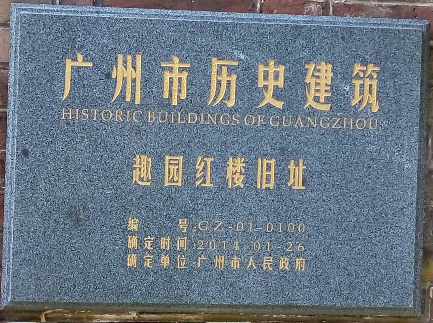 粵語: 廣州市歷史建築牌 （例）